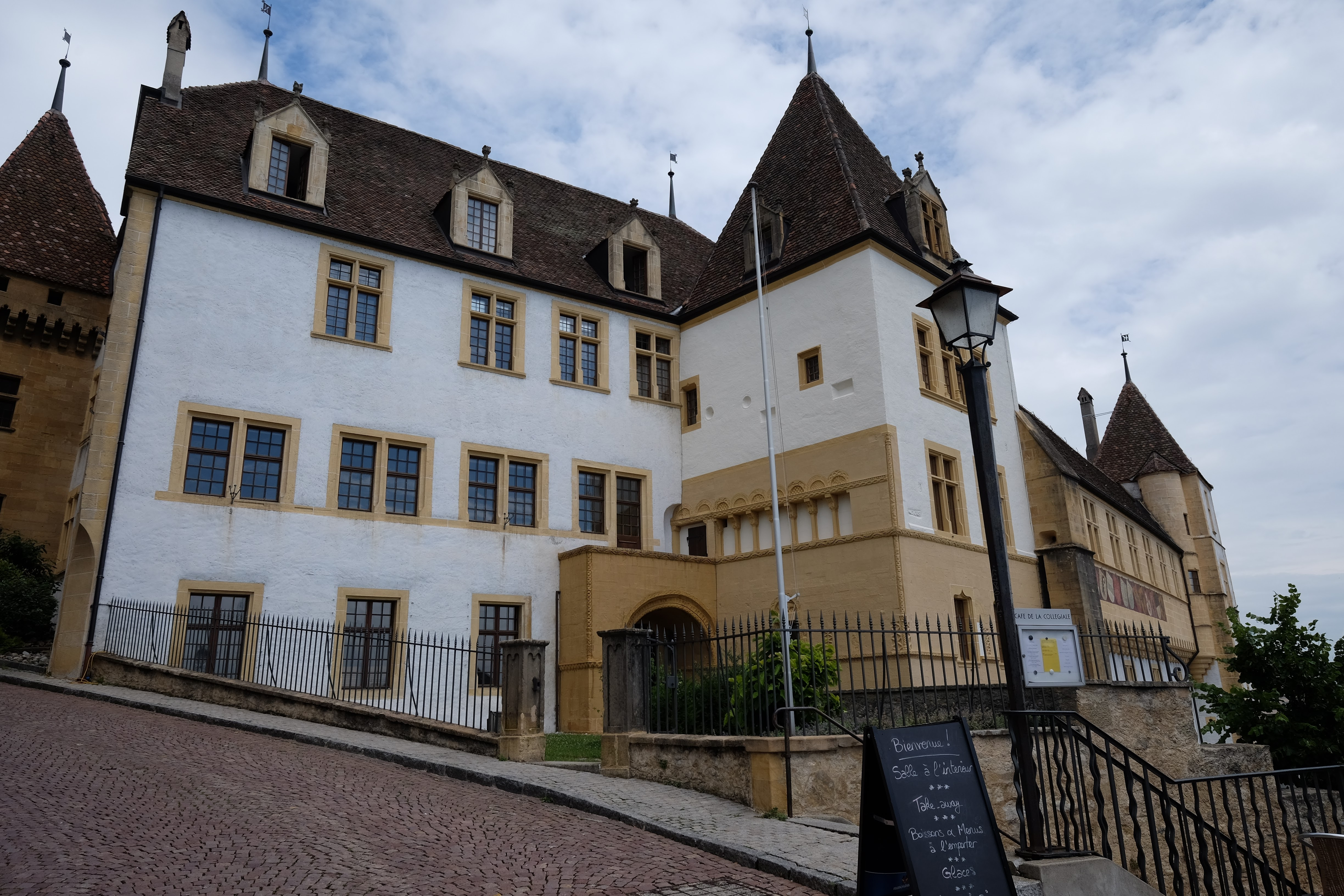 Neuchâtel, Switzerland